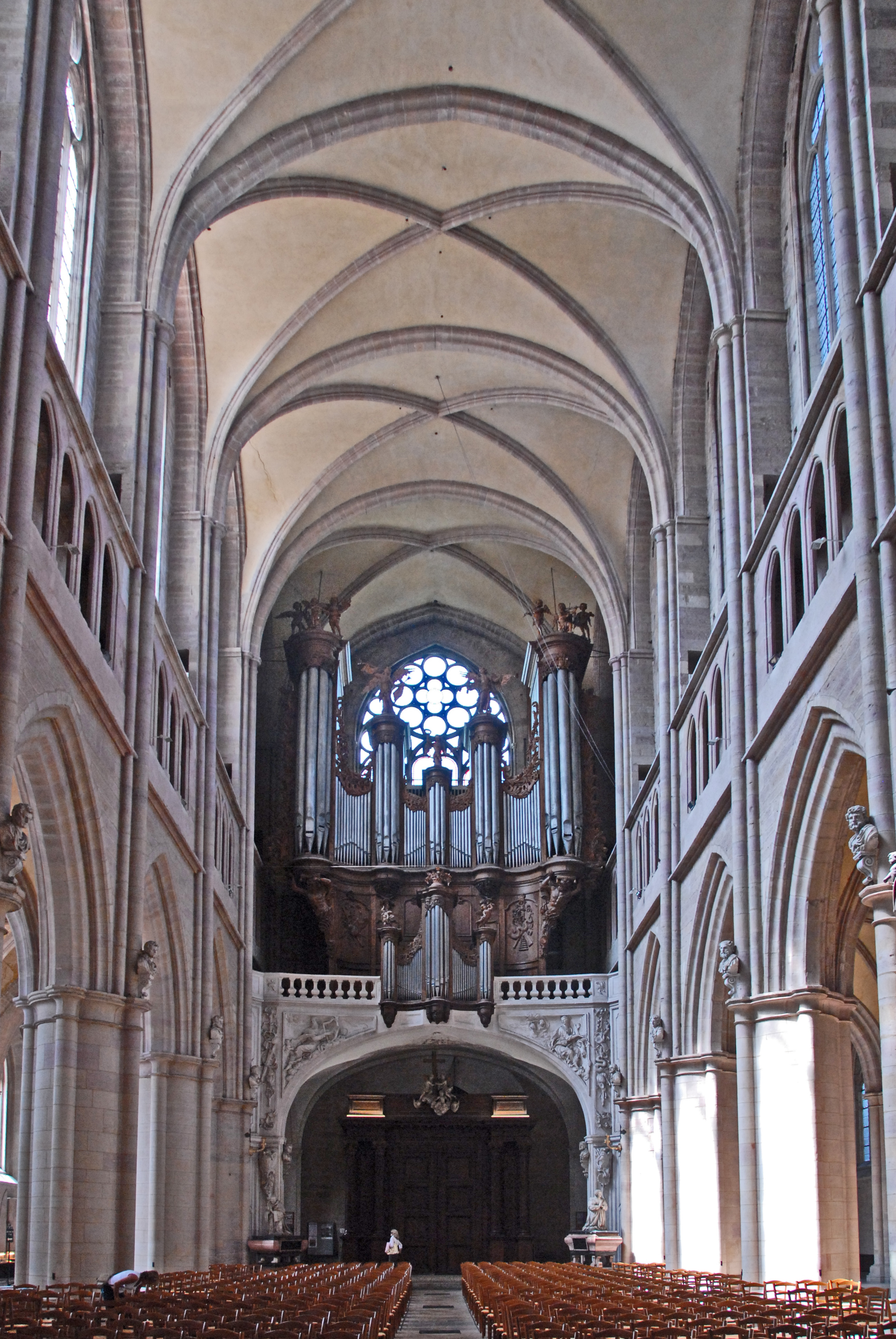 St-Bénigne, Mittelschiff nach hinten